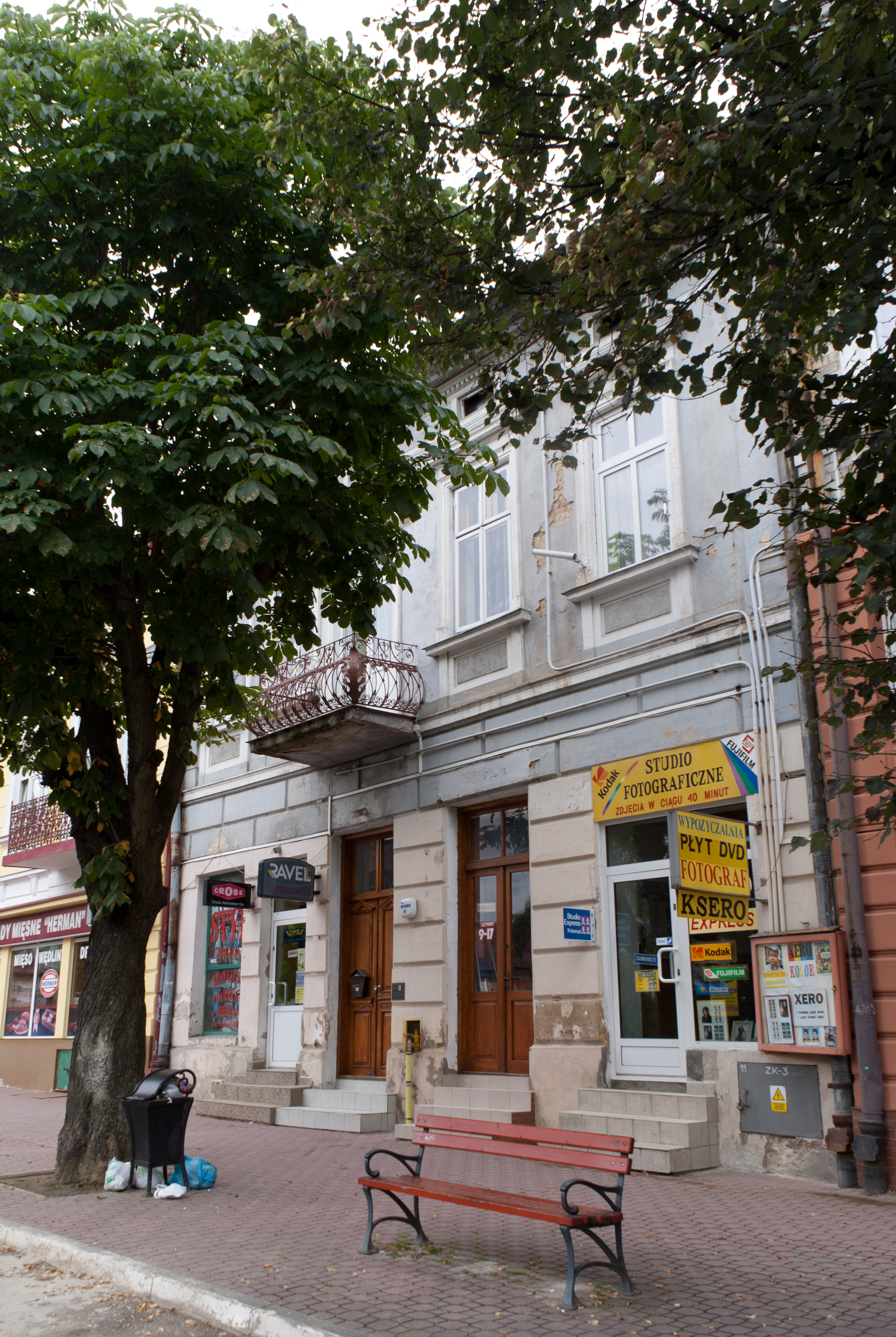 Kamienica przy ul. Rynek 2 w Brzozowie z 2 poł. XIX wieku 07.1994.